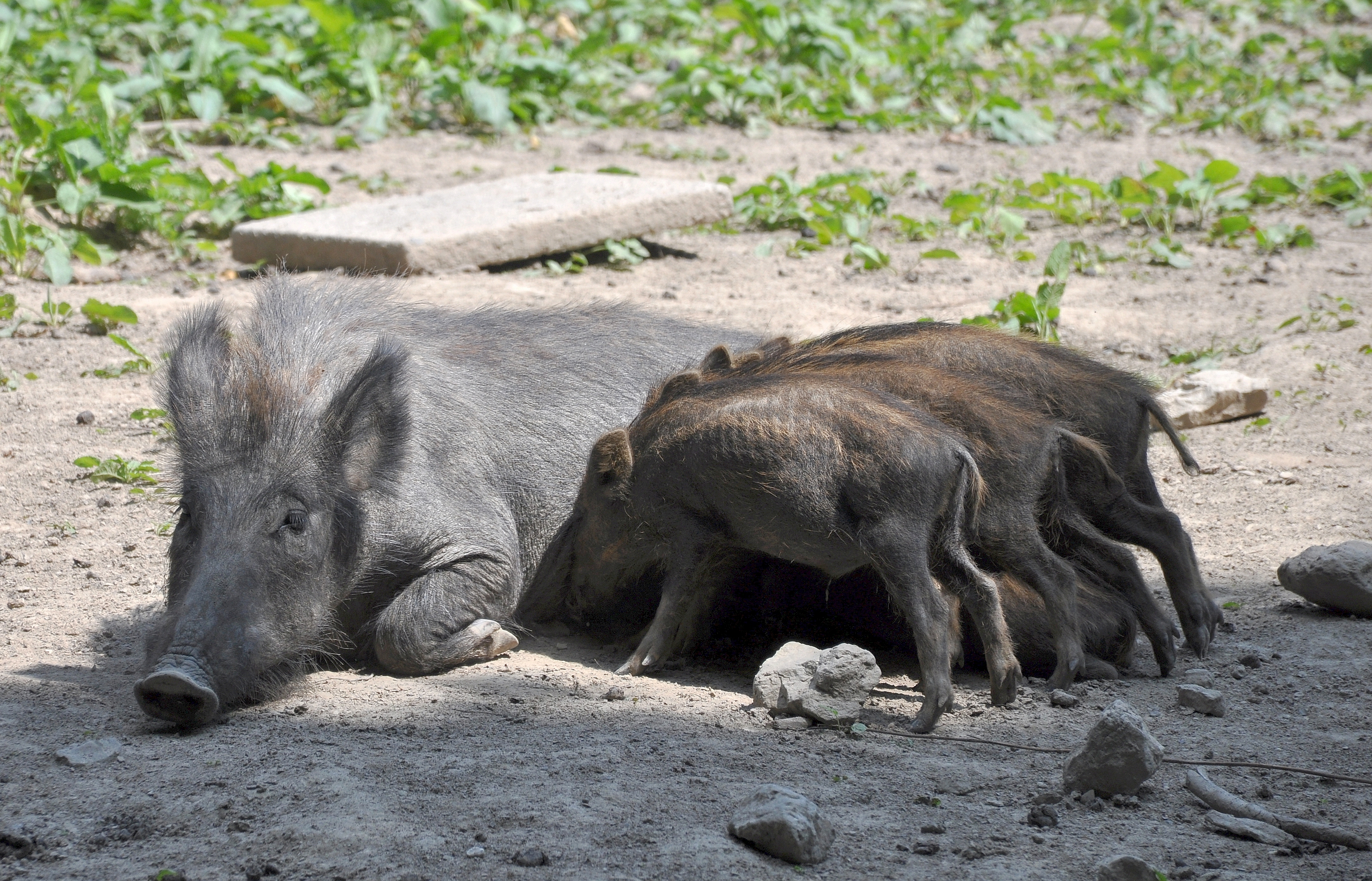 Kottenforster Wildgehege in der Waldau – Bache mit Frischlingen